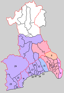 後の兵庫県武庫郡域の町村制時点の町村。